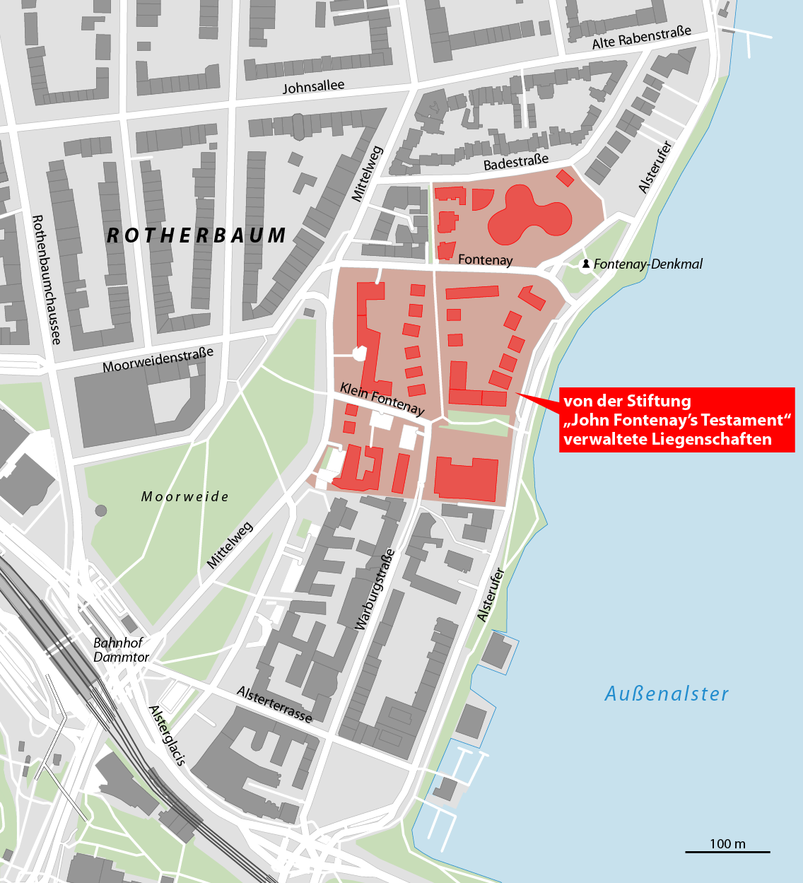 Von der Stiftung „John Fontenay's Testament“ verwaltete Liegenschaften in Hamburg-Rotherbaum This map may be incomplete, and may contain errors. Don't rely solely on it for navigation.